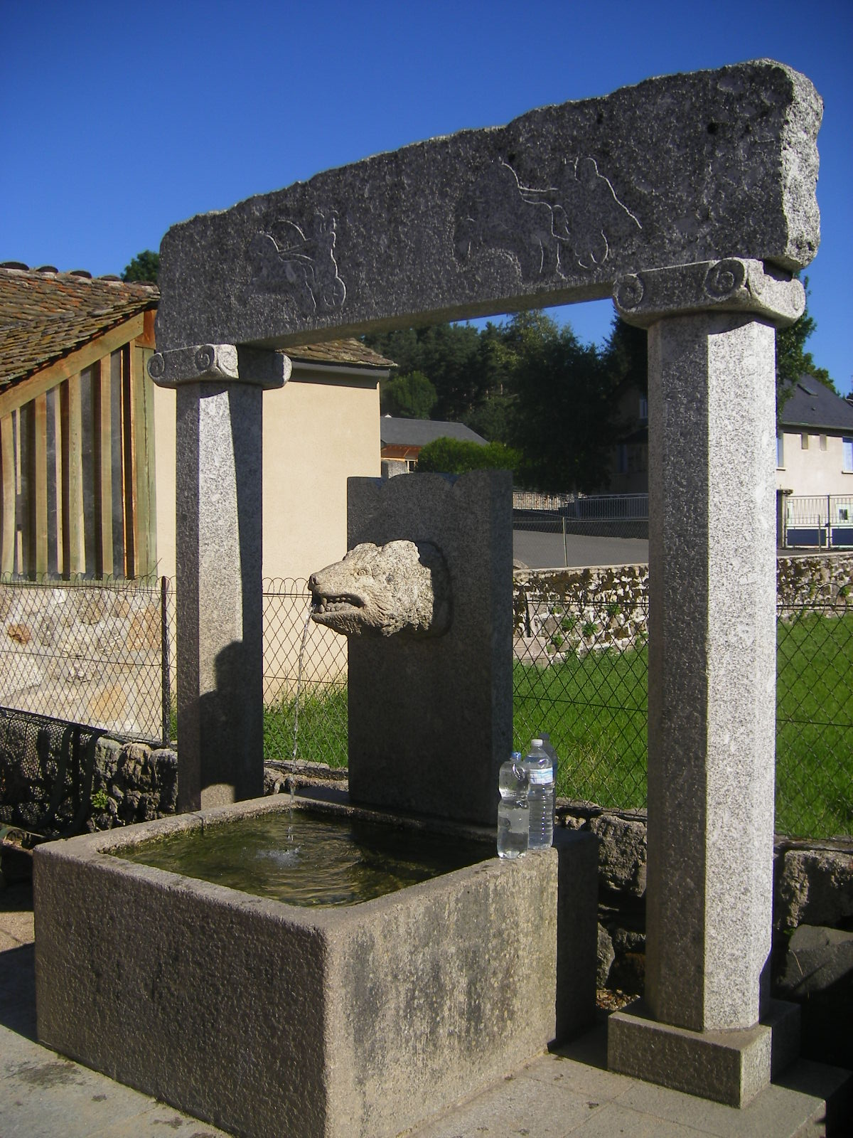 Javols